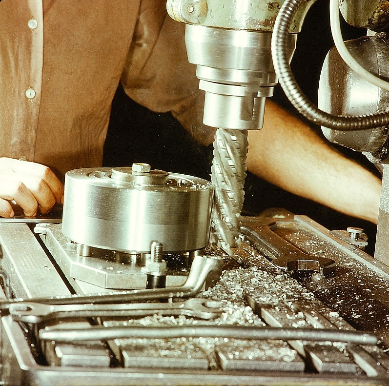 Original image description from the Deutsche FotothekZerspannungsfacharbeiter